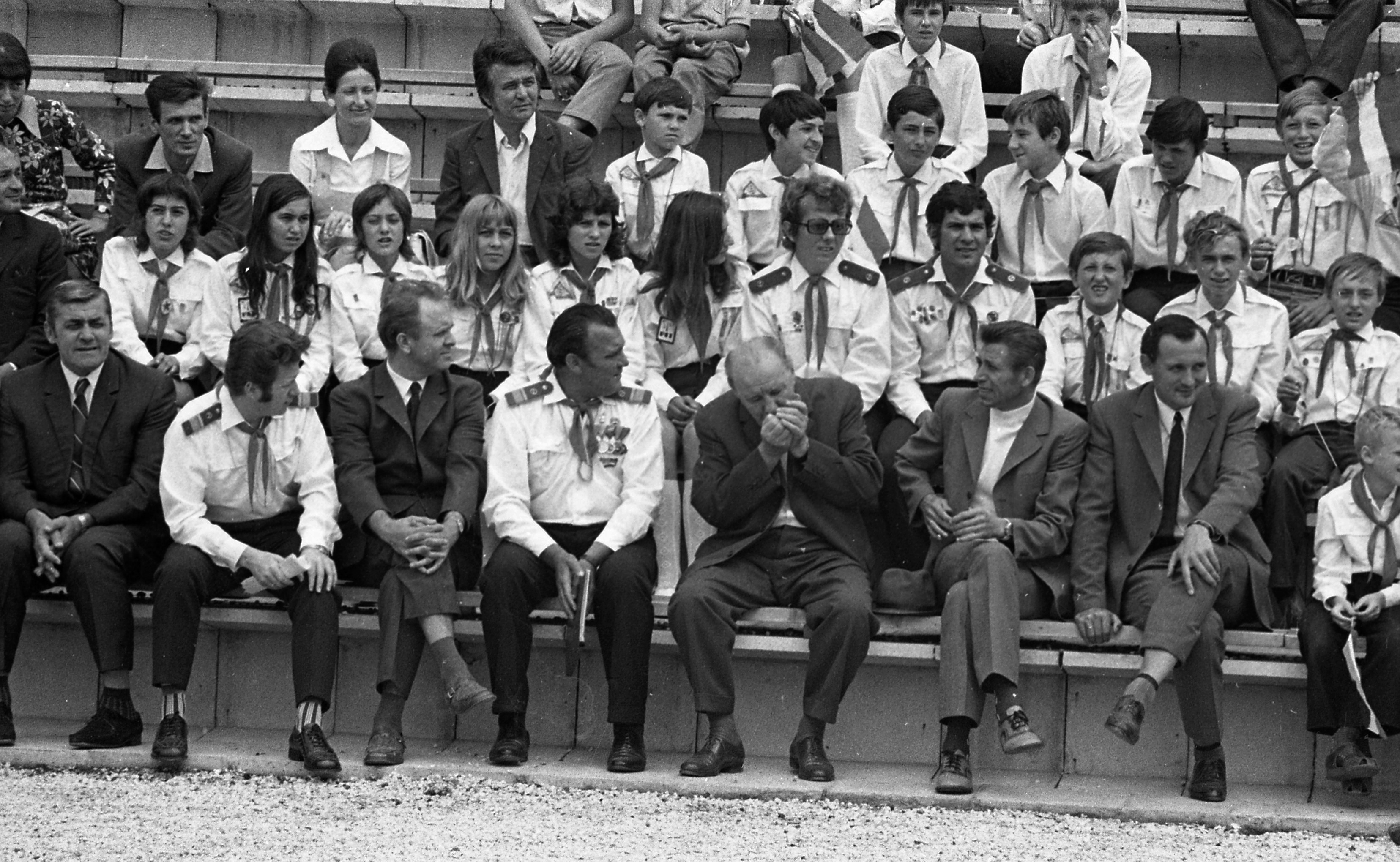 Csillebérc (Úttörőváros), Kádár János rágyújt, tőle jobbra a második Maróthy László. Location: Hungary, Budapest XII. Tags: Budapest Title: Csillebérc (Úttörőváros), Kádár János rágyújt, tőle jobbra a második Maróthy László.